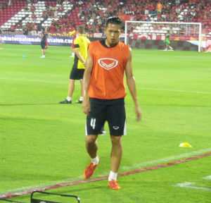 Piyaphon Phanichakul